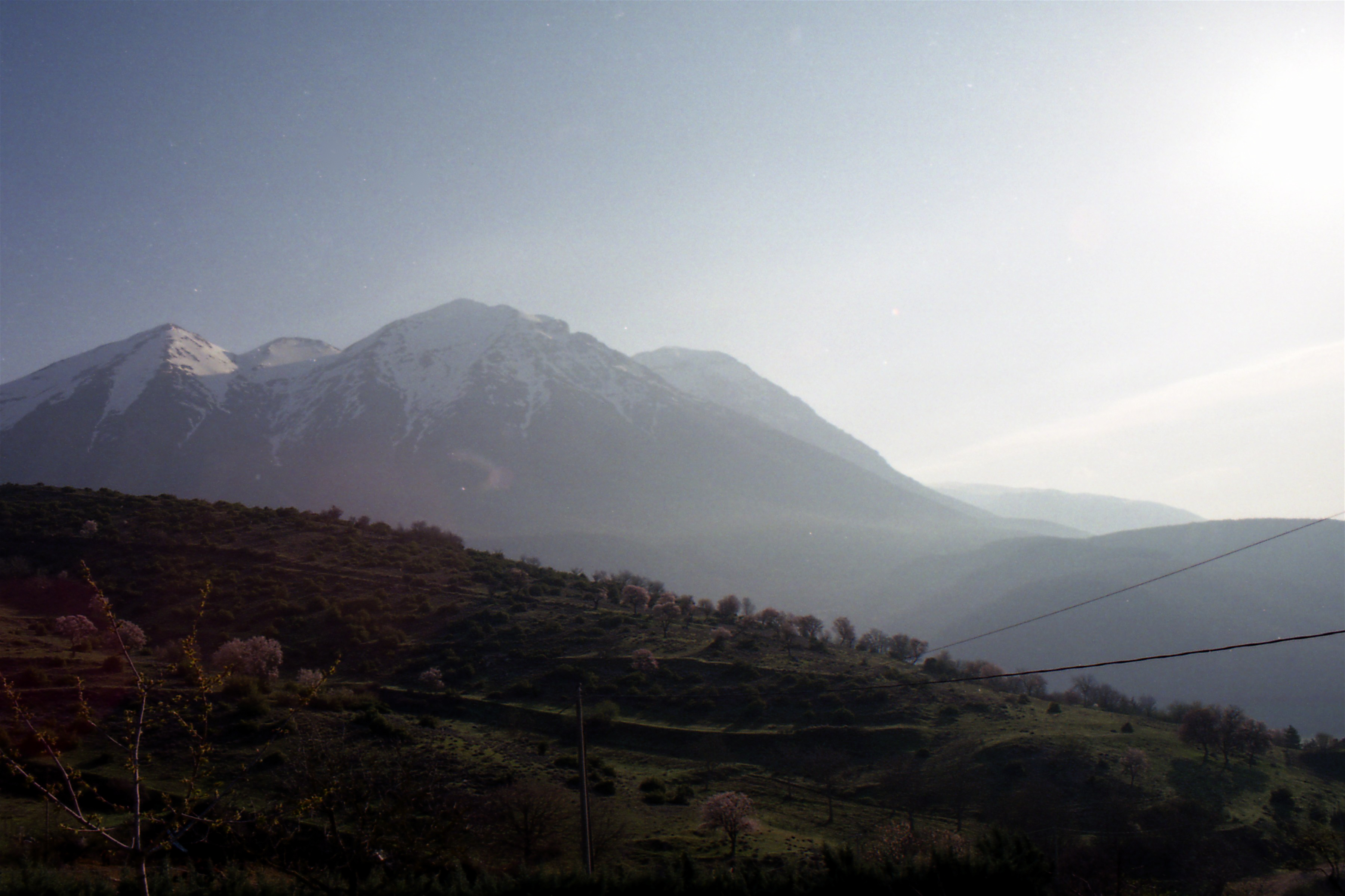 Prime luci del mattino sul Monte Velino, visto da Rosciolo